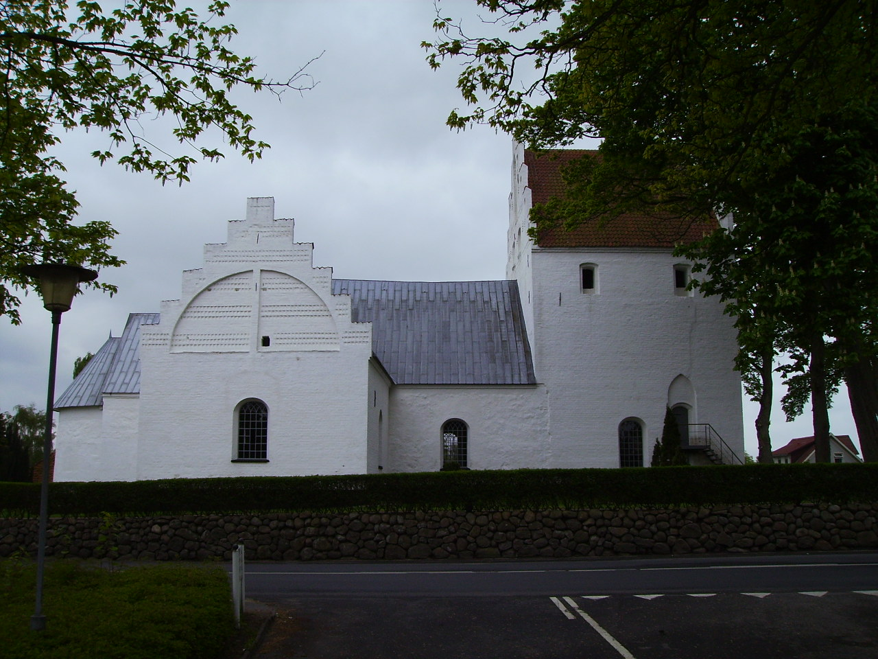 Sanderum Kirke, Sanderum Sogn, Odense Herred, Odense Amt, Denmark (Danish Church) Date: 17.05.2006